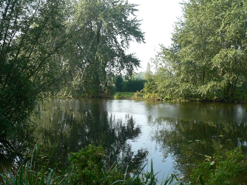 Poldervaart Schiedam